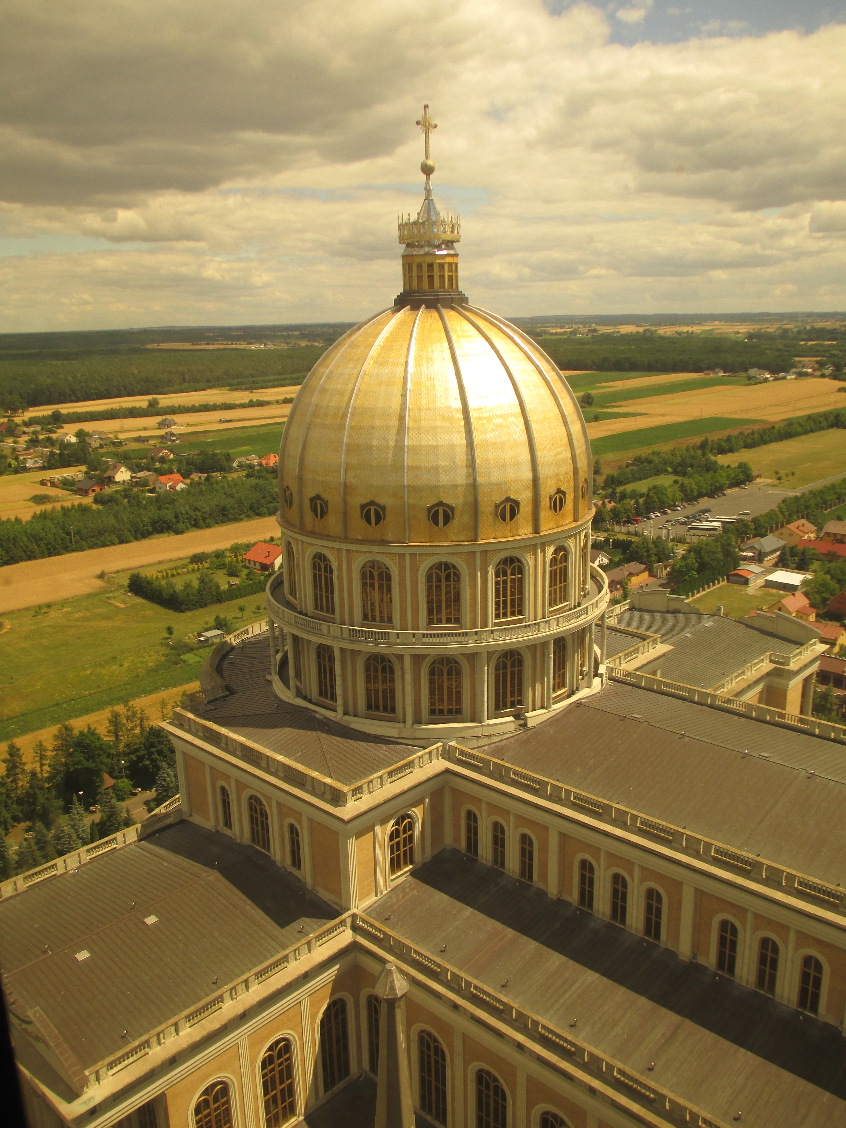 Główna kopuła Sanktuarium Cudownego Obrazu Matki Boskiej Licheńskiej